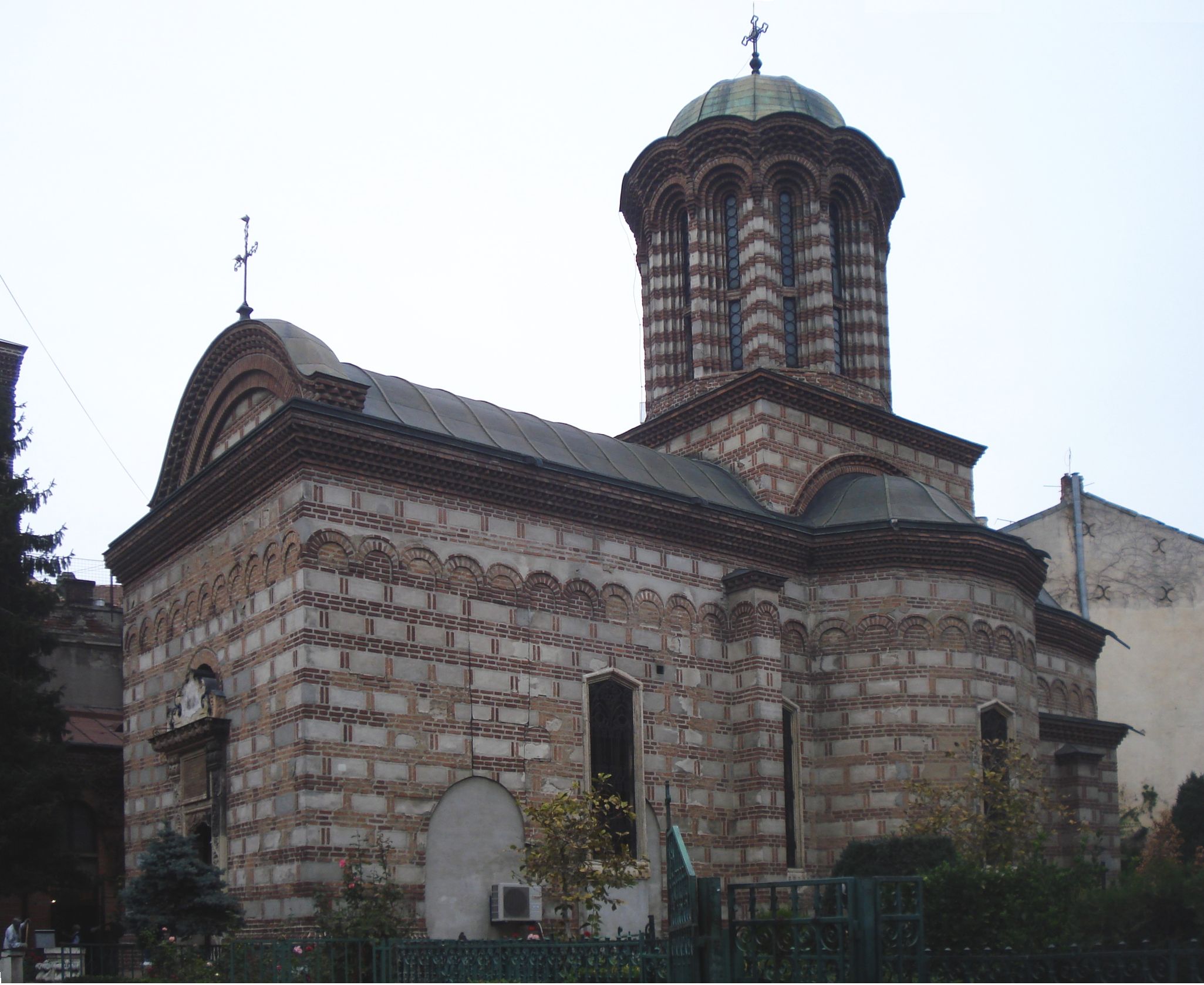 Biserica Curtea Veche 01